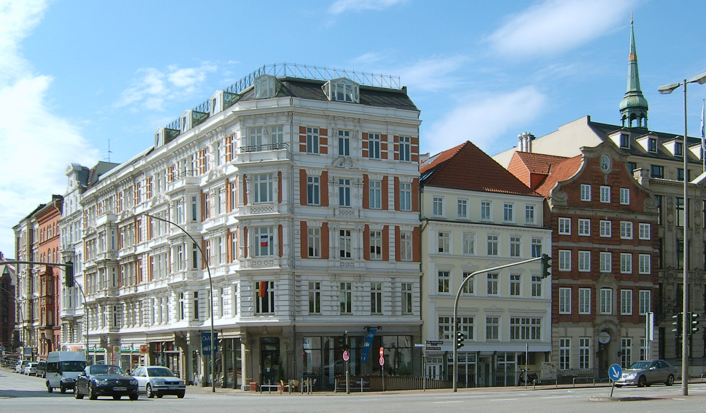 Die Ecke Brandstwiete/Willy-Brandt-Straße in Hamburg-Altstadt